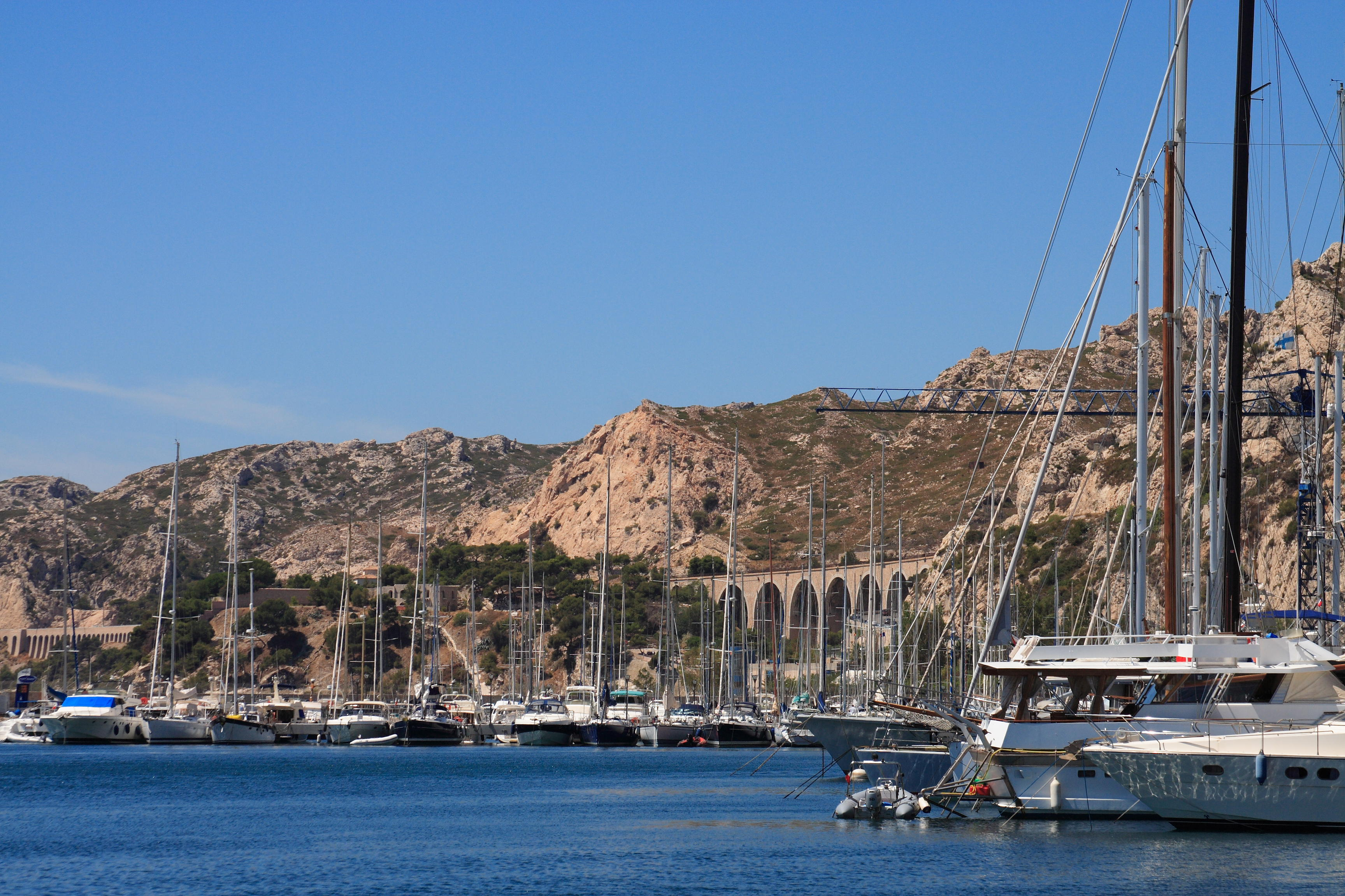 a port of Estaque(Marseille, France)